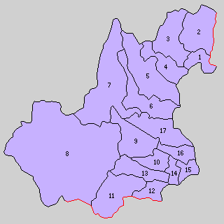 滋賀県高島郡の町村制時点の町村。